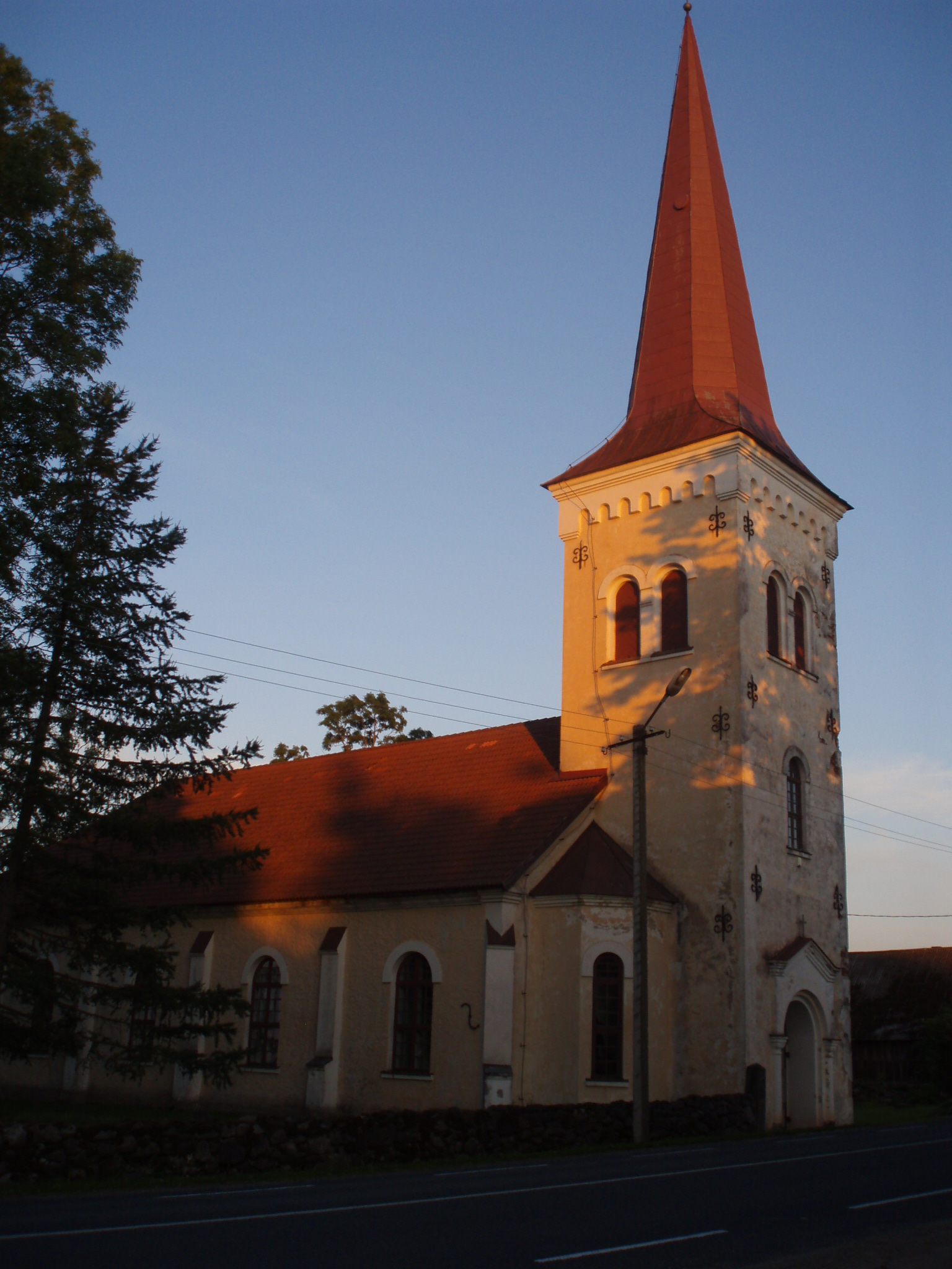 Kõpu kirik